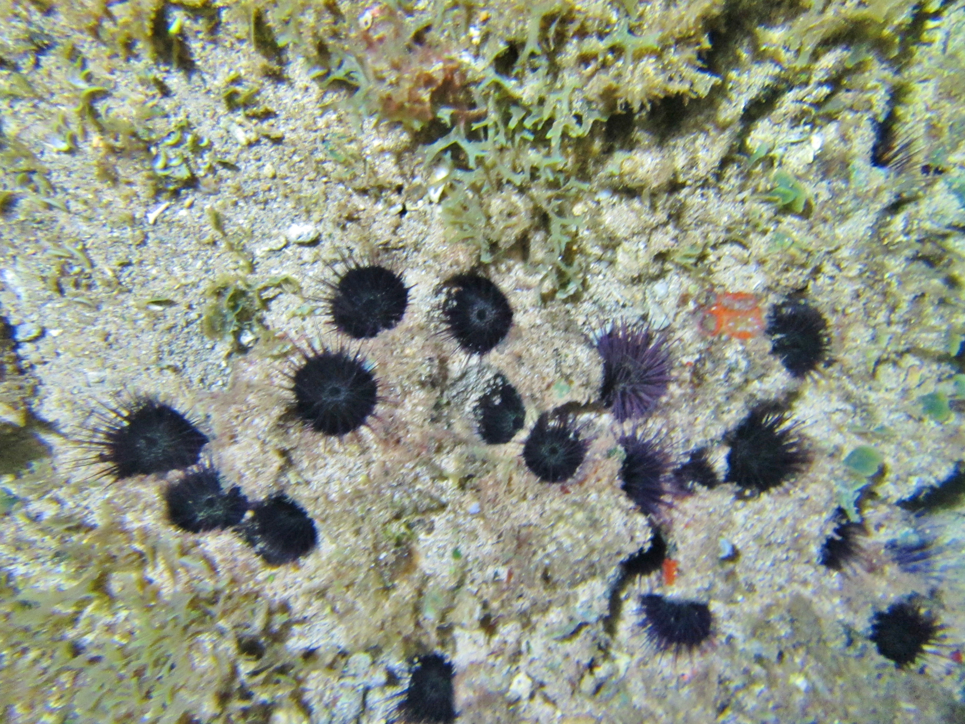 Une roche trouée par de nombreux oursins Echinostrephus molaris à Mayotte.